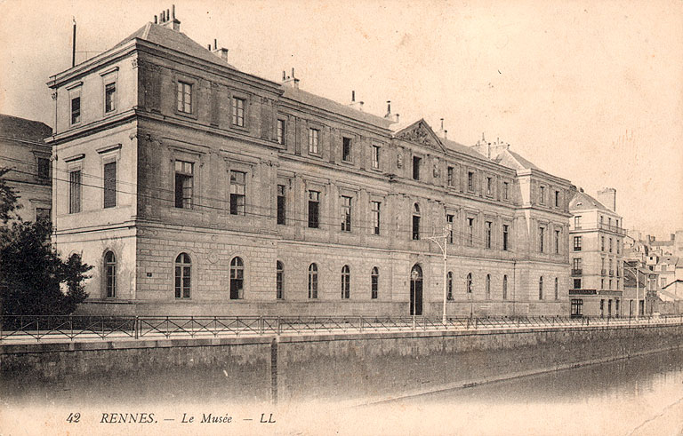 Vue de la façade du musée, quai Emile-Zola à Rennes.